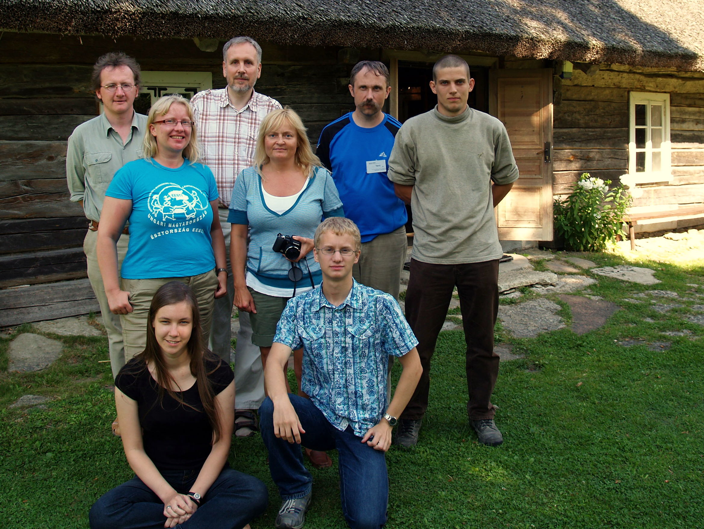 Kohalesaabunud vikipedistide grupipilt. Pildistatud Mihkli talu eluhoone ees.